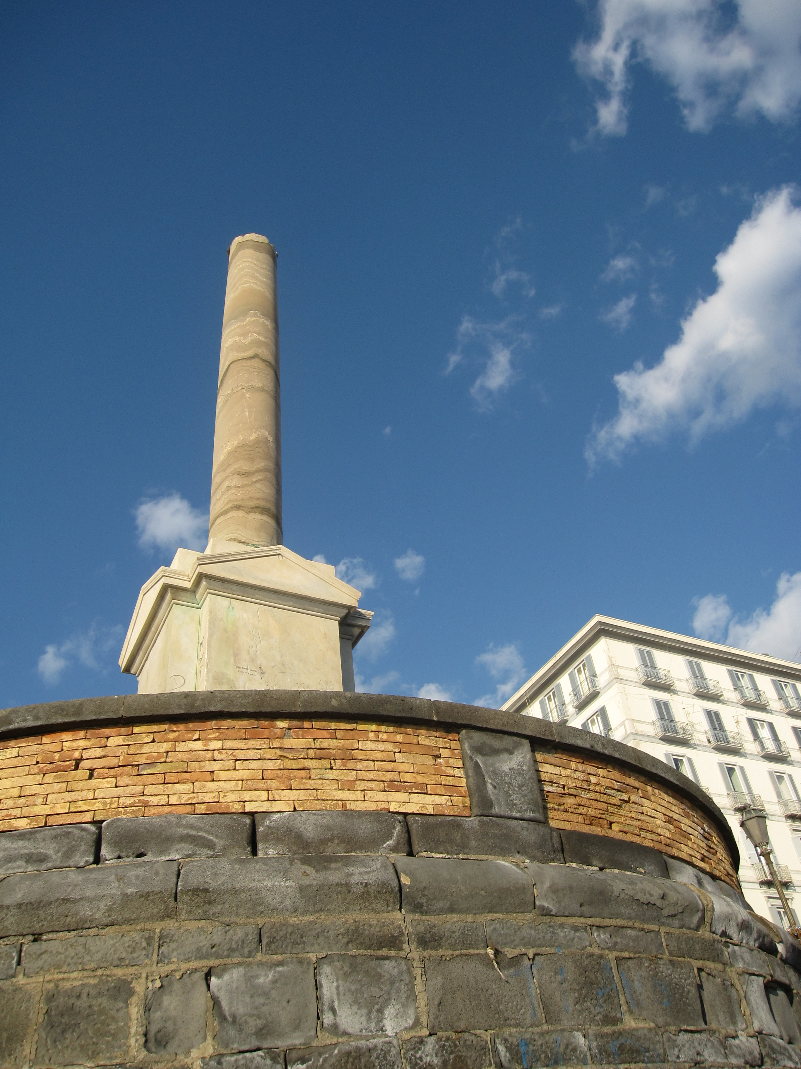 Colonna spezzata a Mergellina (Napoli). Di fronte a Piazza Vittoria.